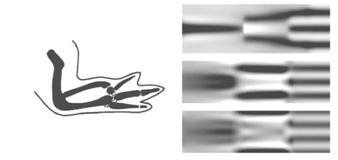 Patterning in der Extremitätenknospe